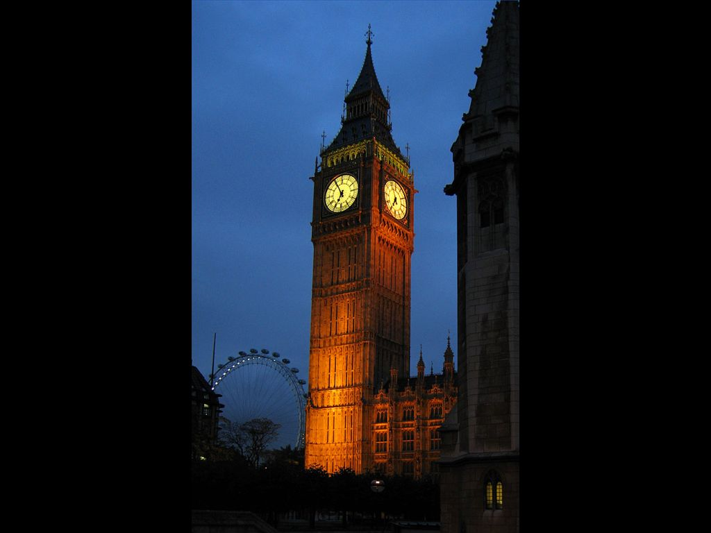 Illustration de l'affichage d'une photo en mode paysage.